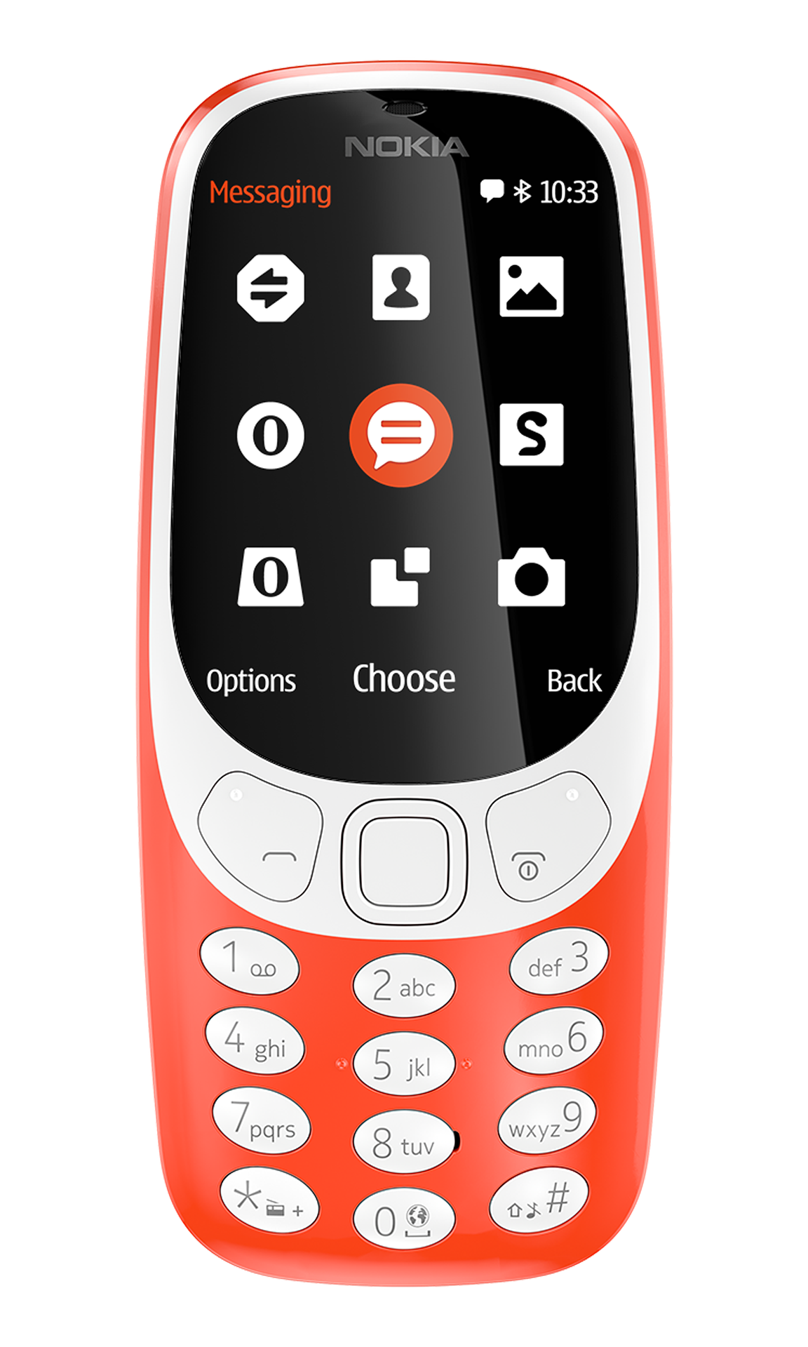 Новый Nokia 3310 имеет цветной экран и более современный.